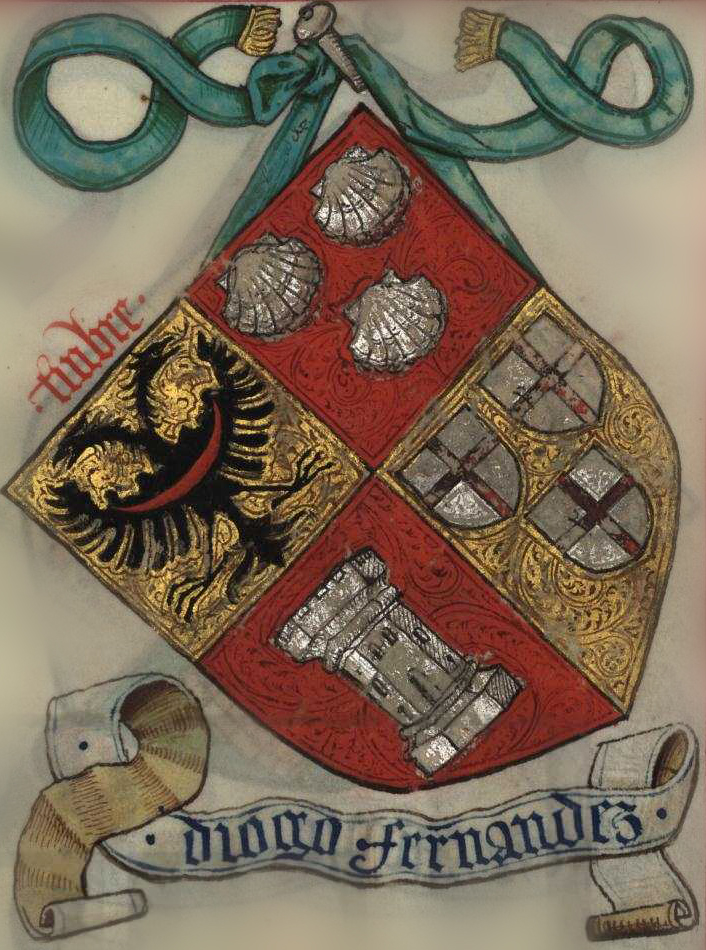 Brasão de Diogo Fernandes, Livro do Armeiro-Mor, fl.129, João de Cró, ca. 1509.